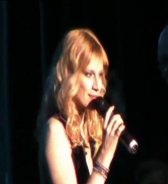 Мина Лазаревић 2009 у Дому синдиката